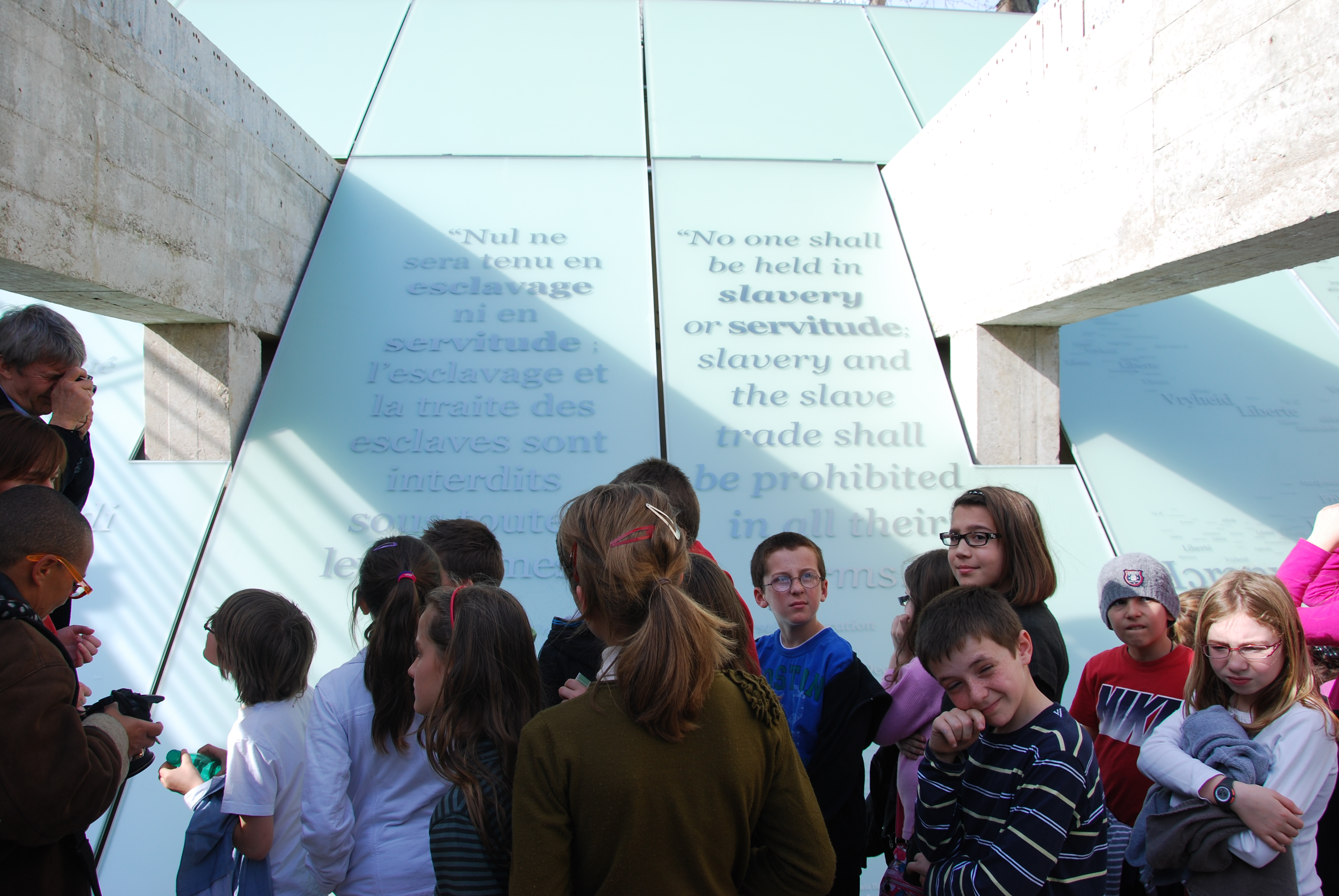 Inauguration du Mémorial de l'abolition de l'esclavage de Nantes, le 25 mars 2012.